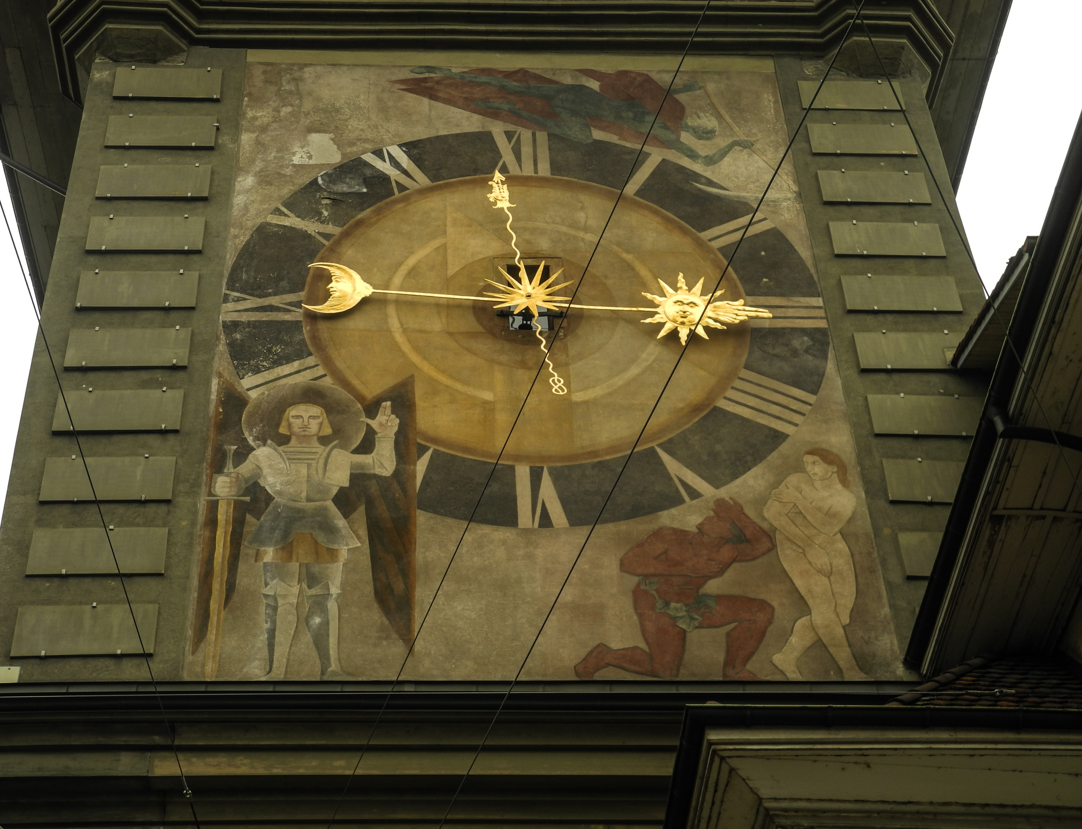 Berner Zytgloggeturm. Das Fresko von Victor Surbek 1930